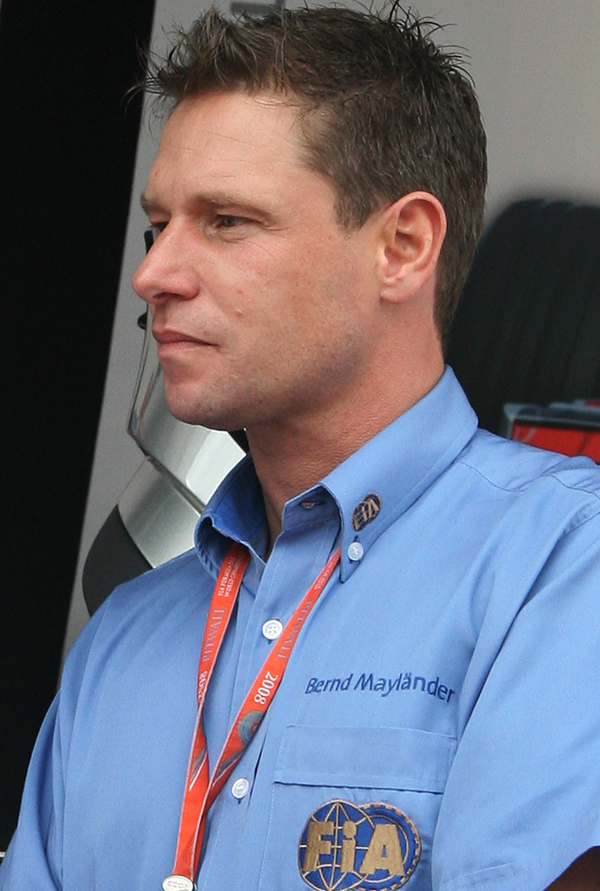 Formula One 2008 Rd.16 Japanese GP: Bernd Mayländer